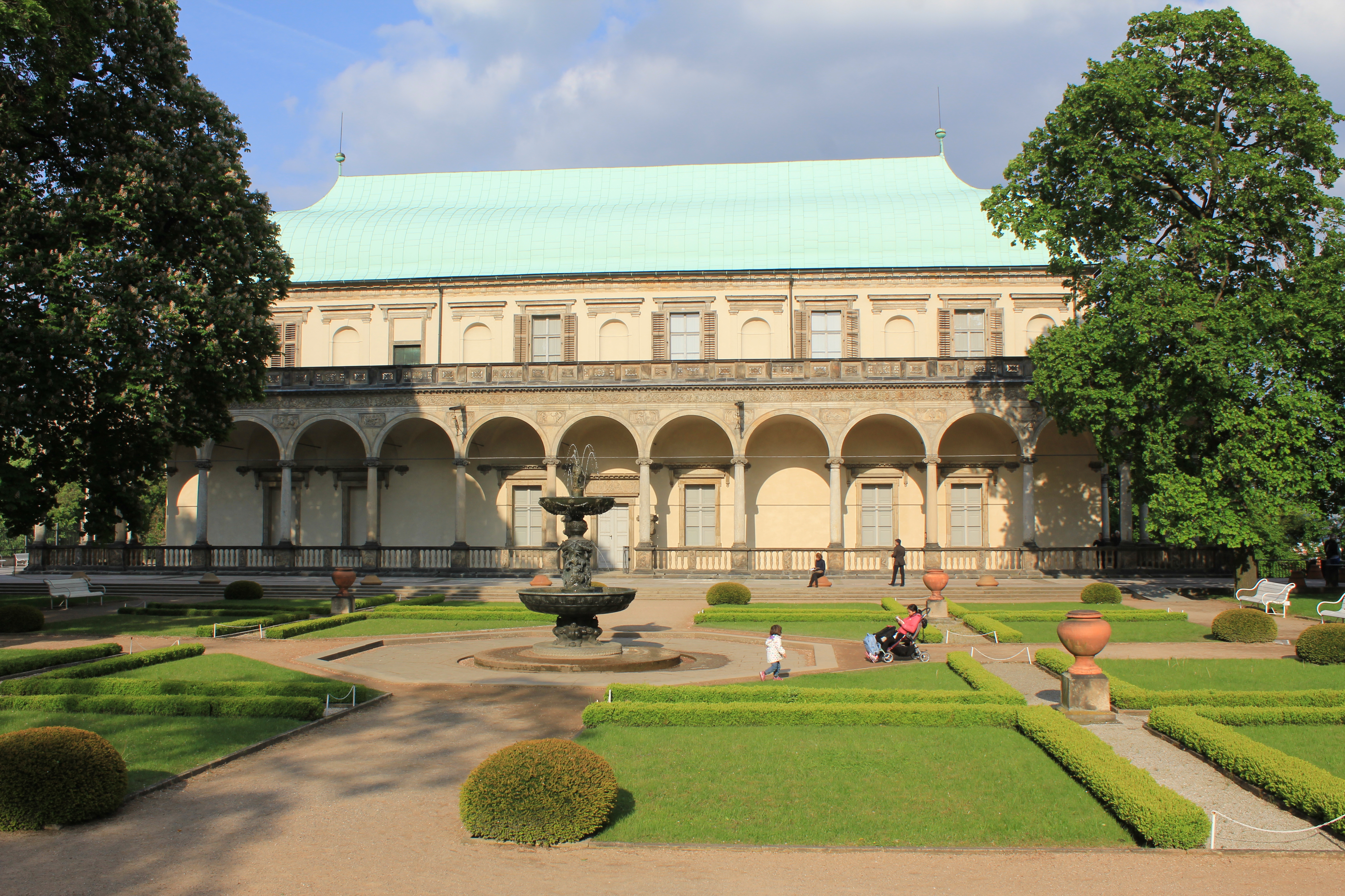 Belvedere